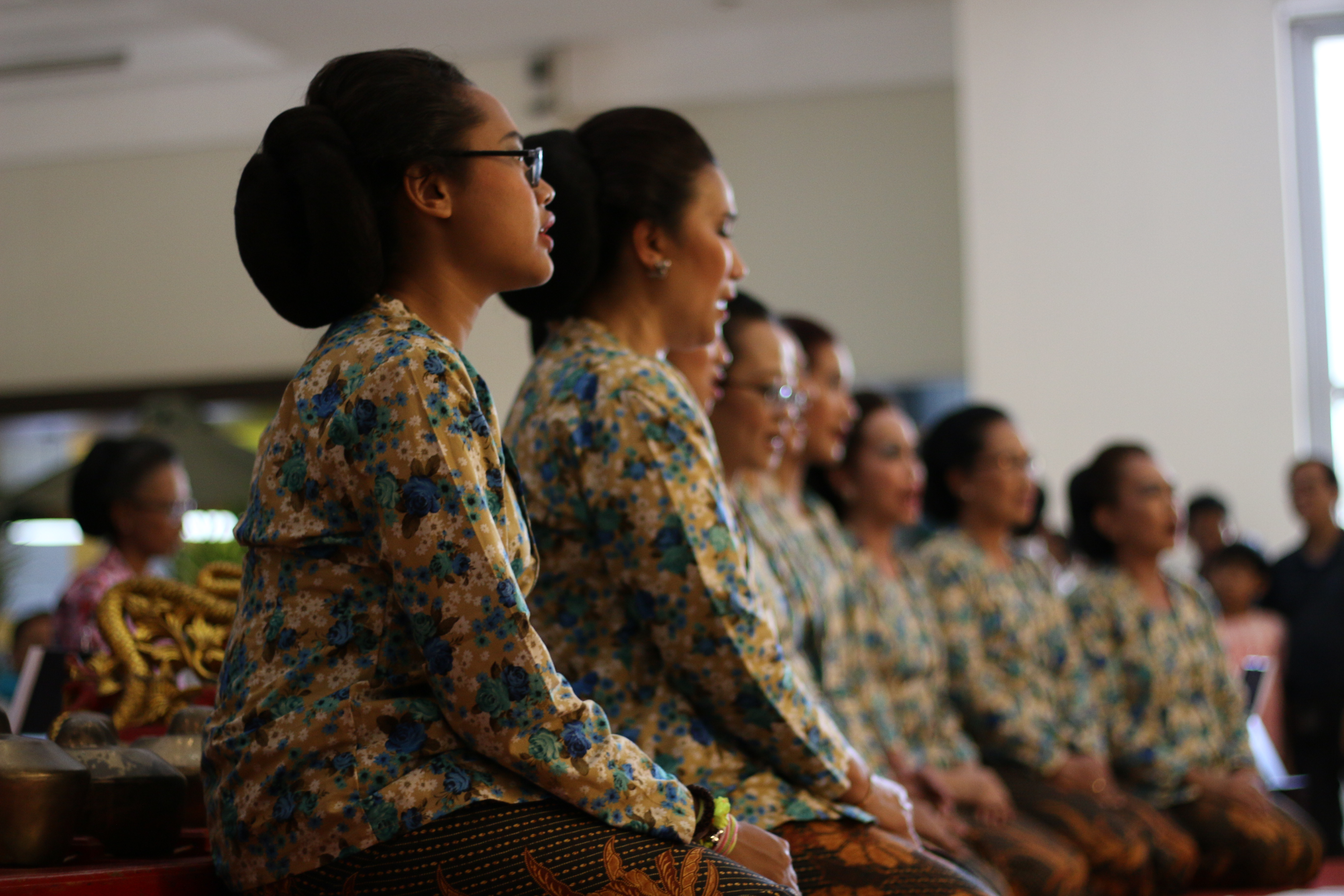 Penampilan Laras Kanita dalam rangka International Women's Day di Museum Nasional Indonesia, Jakarta pada tangga 7 Maret 2020. Terlihat para penyinden dengan anggunnya melantunkan syair-syair jawa.